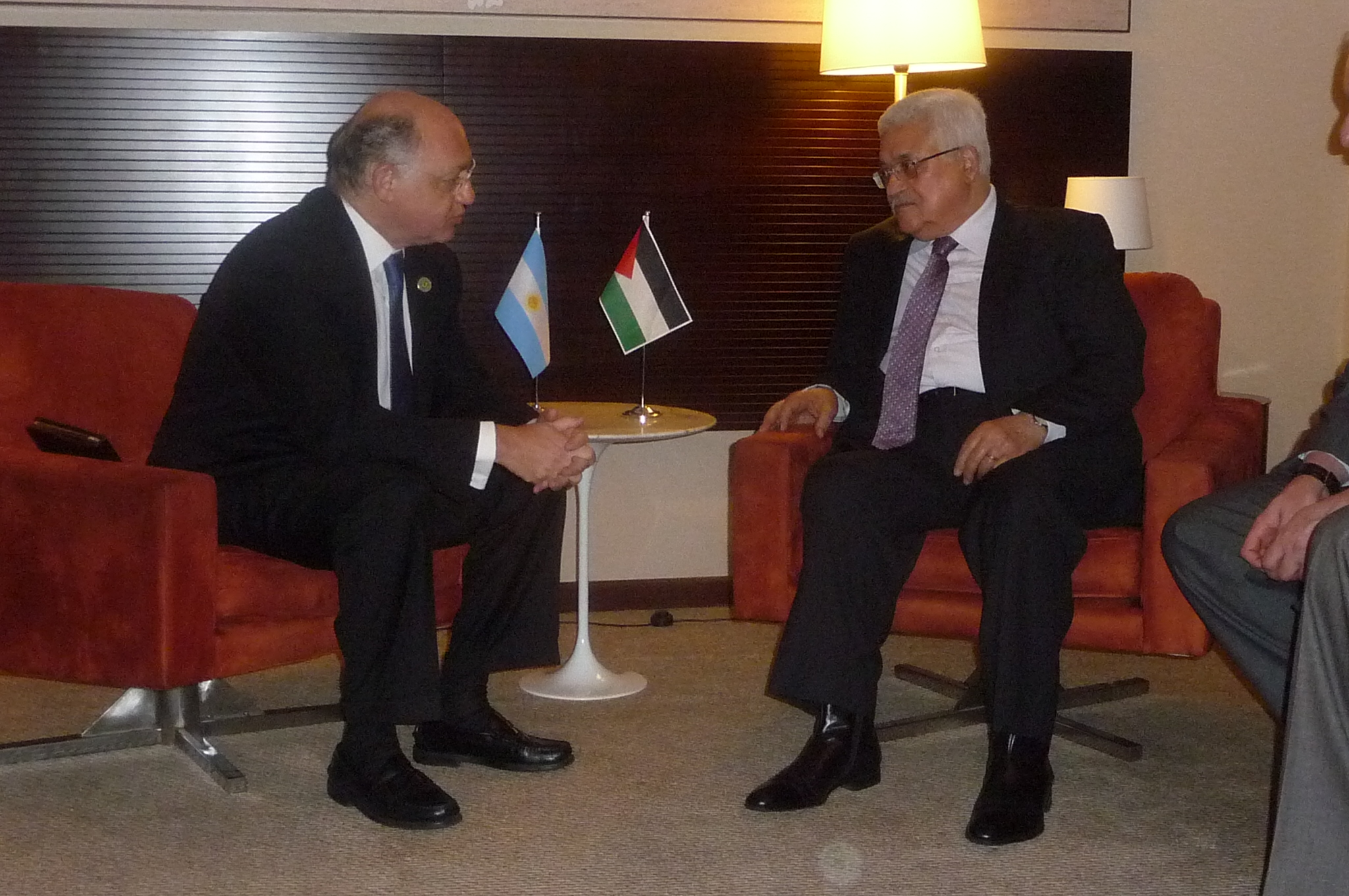 El Canciller Timerman con el Presidente de la Autoridad Nacional Palestina, Mahmoud Abbas.